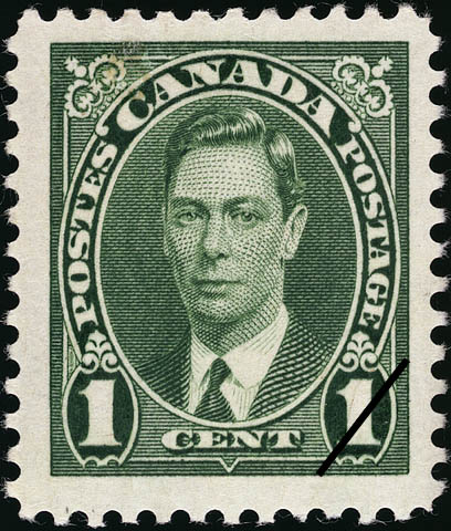 Timbre Poste Canada 1 cent George VI 1937